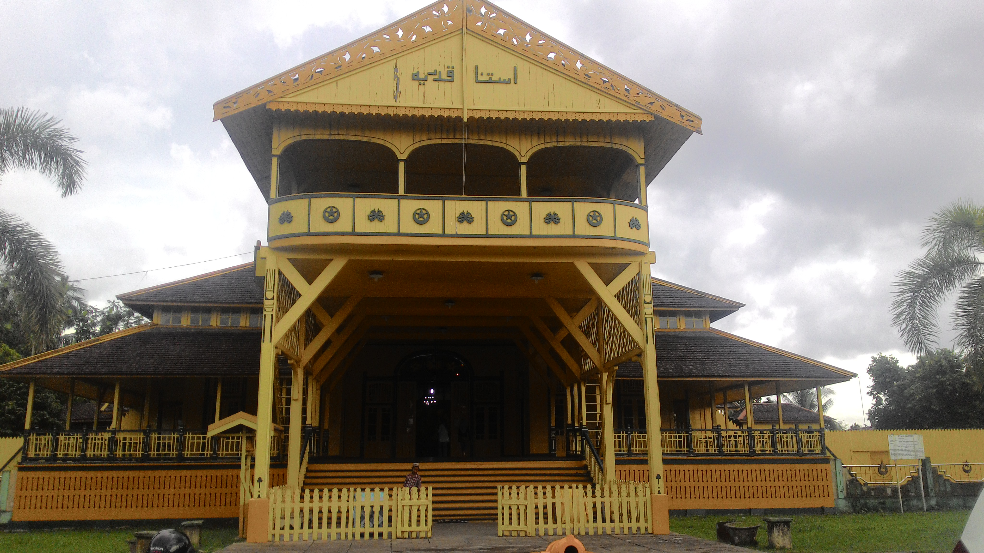 Berlokasi di Pusat Kota Pontianak dengan warna kuning khas Keraton Melayu telah disulap menjadi museum dan dikelola oleh keturunan Raja-Raja Kadriyah. Pernah menjadi negara tersendiri yang terpisah dari NKRI lalu menjadi Daerah Istimewa Kalimantan Barat kemudian melebur menjadi NKRI pada 1950.